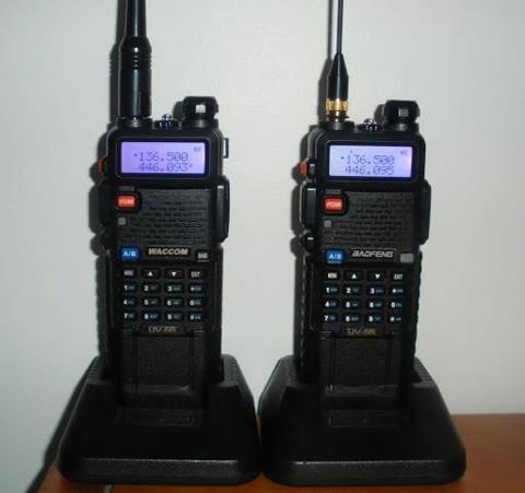 PMR radio portatives